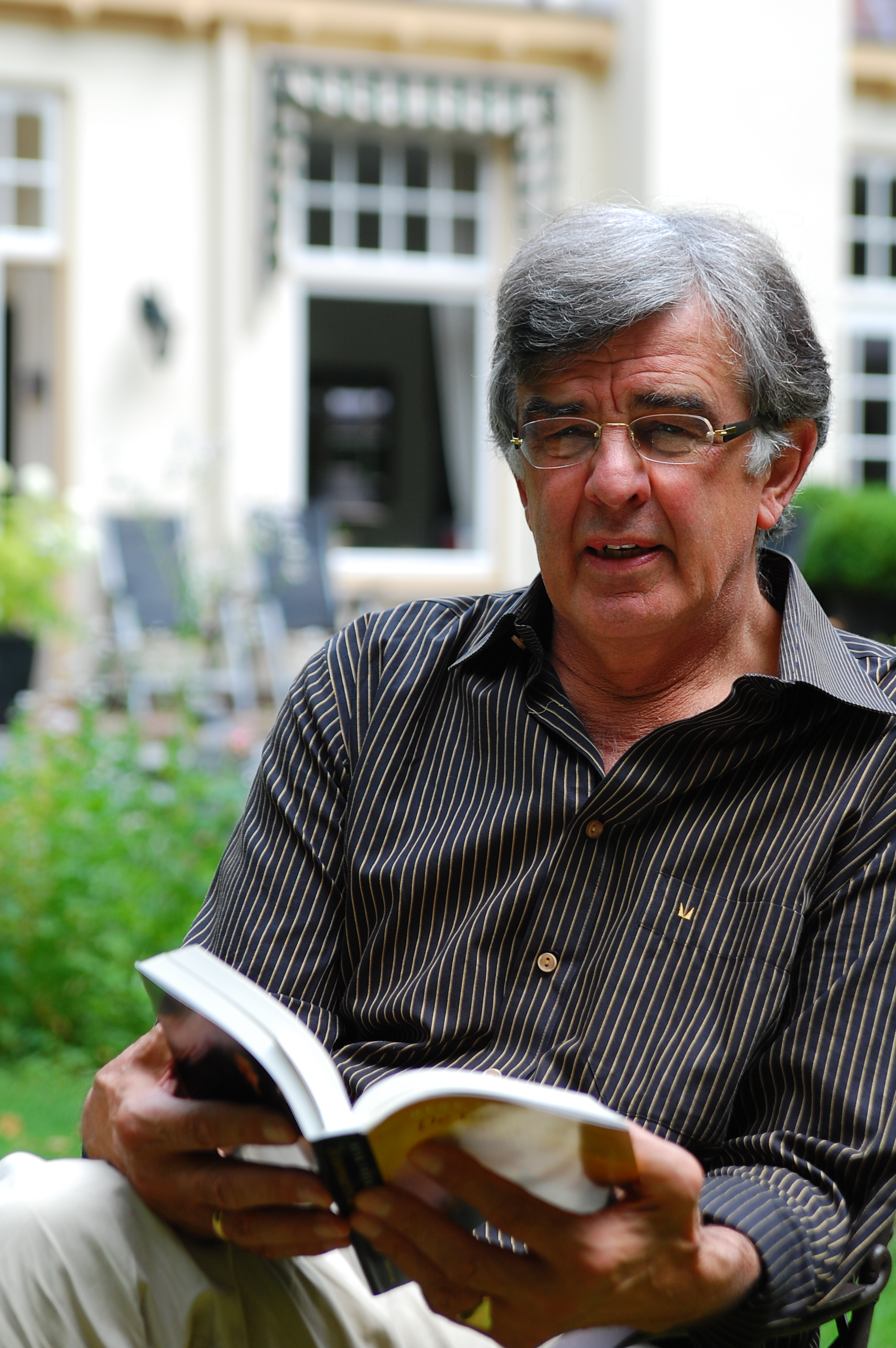 Hendrik (Henk) Vreekamp (Hoevelaken, 14 december 1943) is een Nederlandse theoloog en predikant binnen de Nederlandse Hervormde Kerk (tegenwoordig Protestantse Kerk in Nederland).